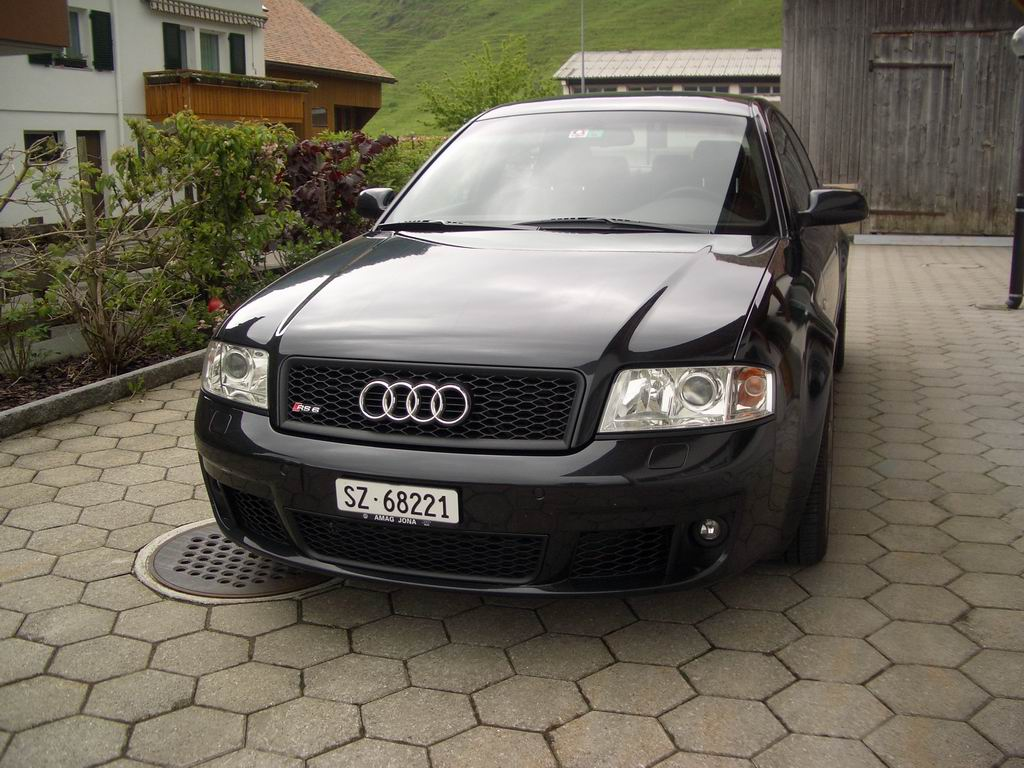 Audi RS6 4.2 V8 Biturbo Limousine